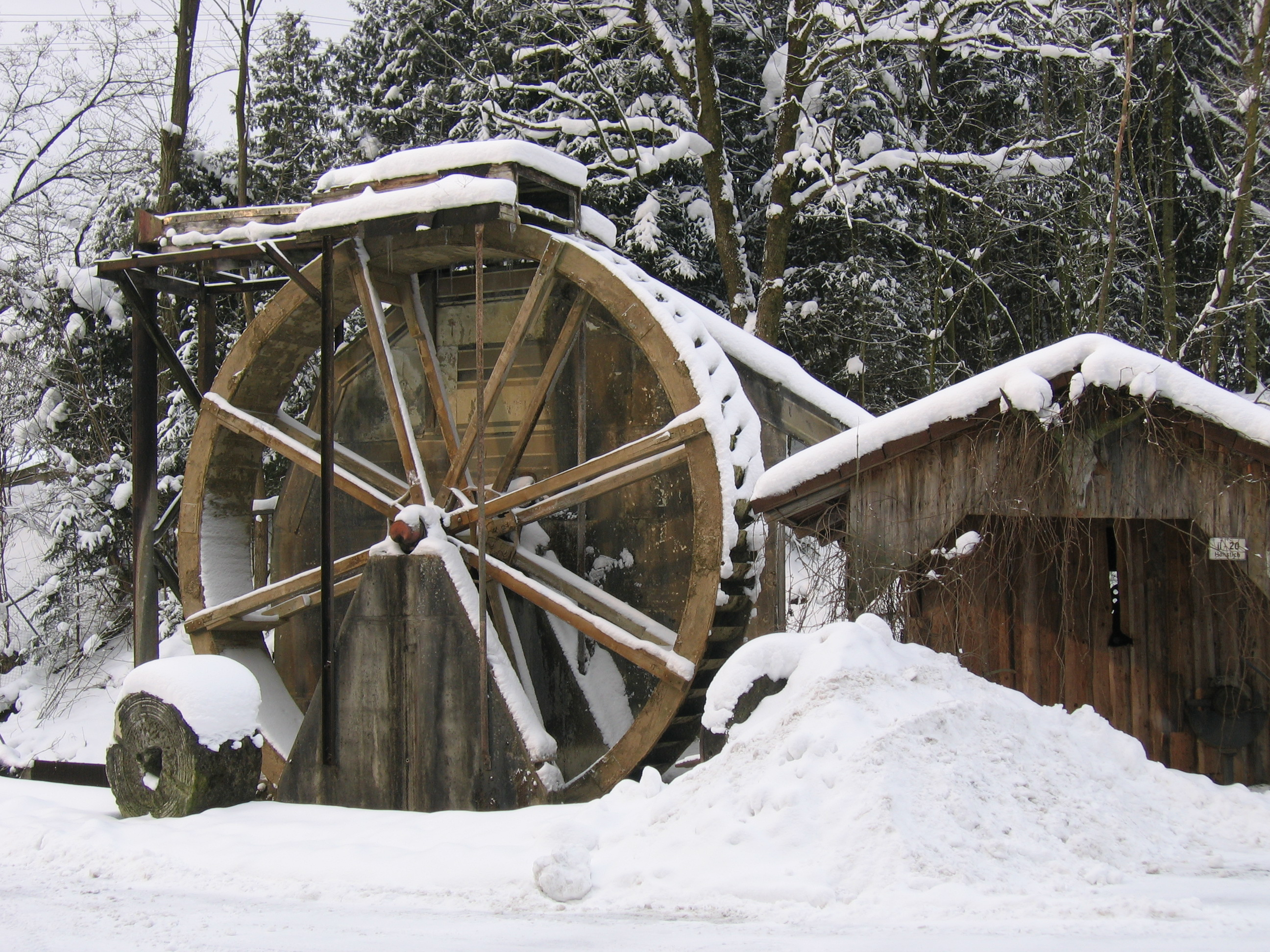 Deutschland - Baden-Württemberg - Landkreis Ravensburg - Bergatreute: Löffelmühle